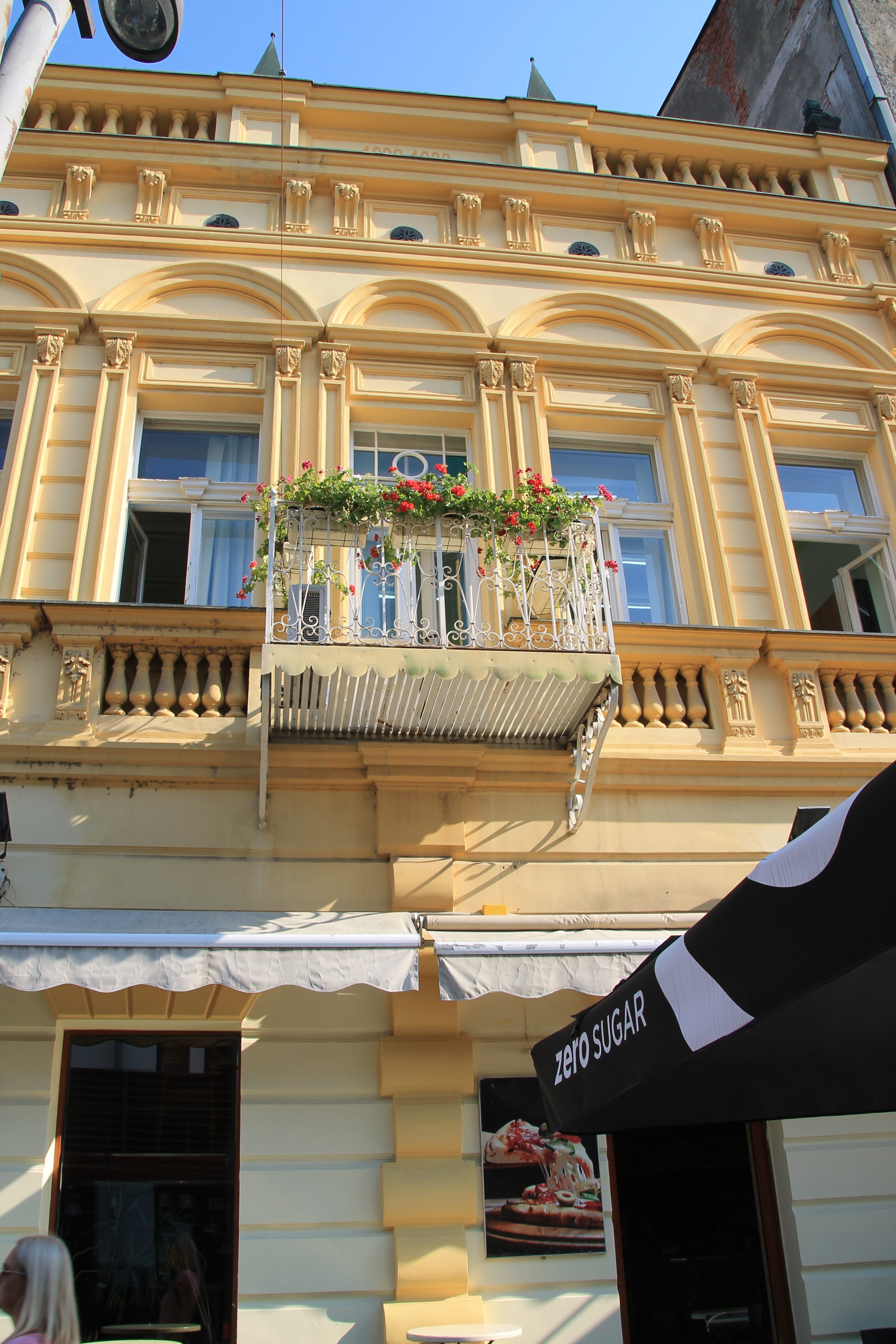 Erića kuća